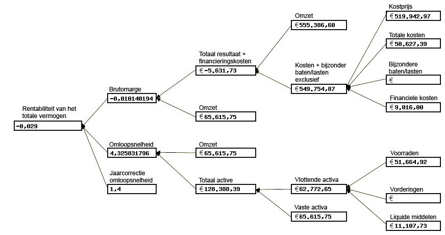 Du-Pont schema.